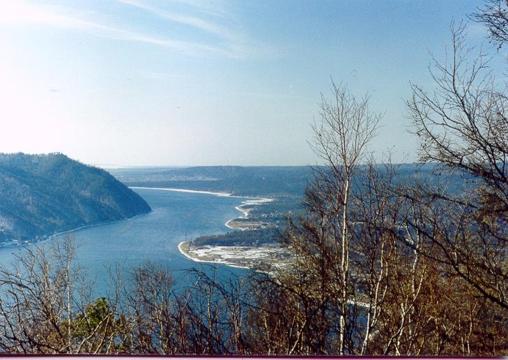 Il fiume Angara in uscita dal Baikal